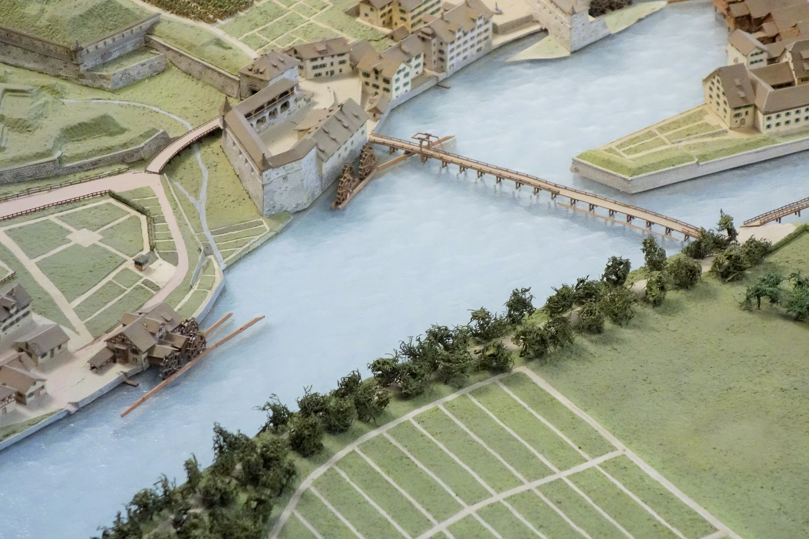 Stadtmodell Zürich um 1800, Haus zum unteren Rech, Zürich, Schweiz